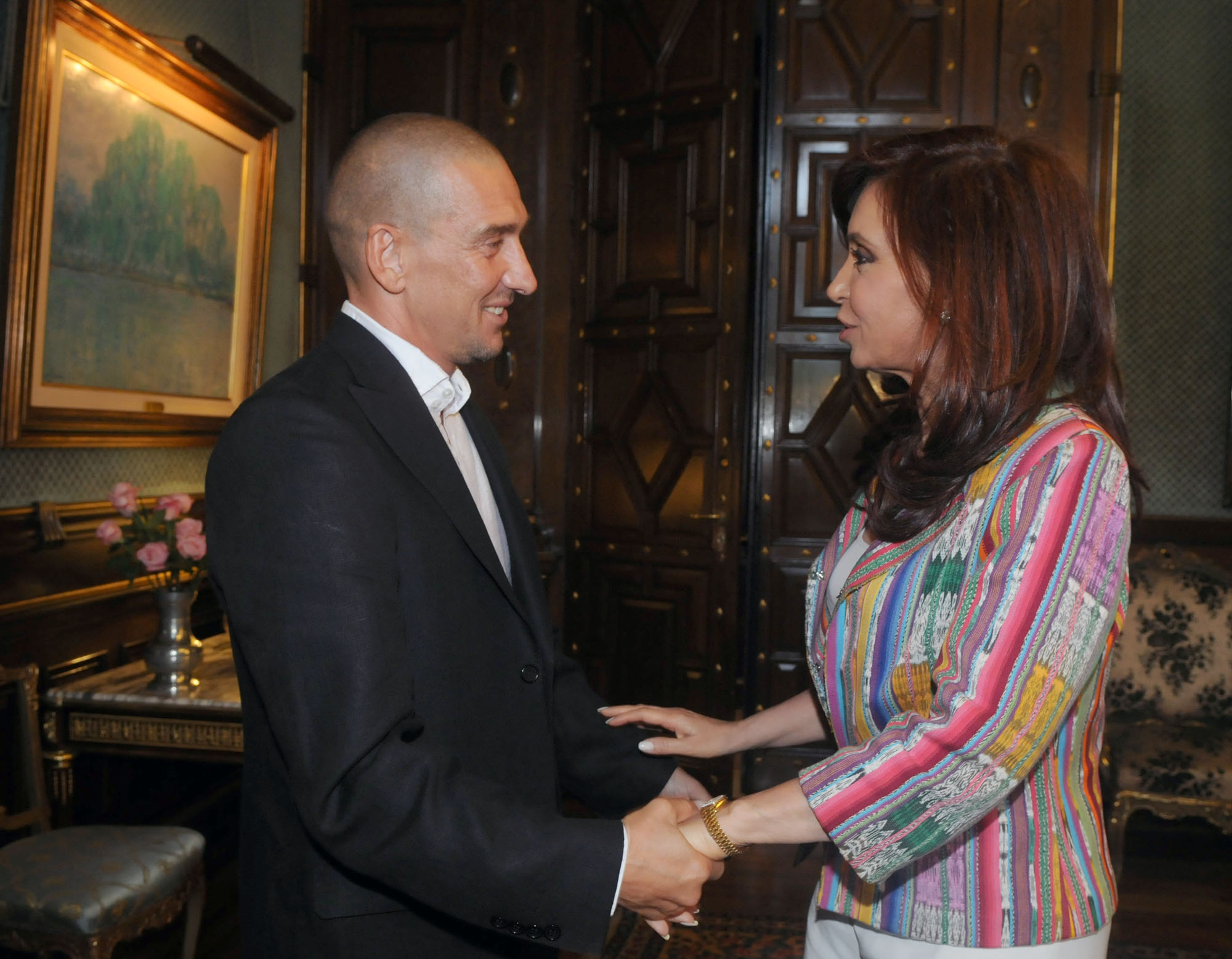 Julio Bocca con la presidenta argentina Cristina Fernandez de Kirchner